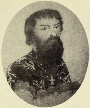 Иван Тарасьевич Грамотин (? — 1638) - подьячий, а затем думный дьяк, видный деятель Смутного времени, трижды, при разных государях, возглавлял Посольский приказ. Описание изображения из источника: Весь портрет 16½ x 13½; медальон 14¾ x 11¼. Приобретён князем М.А. Оболенским на средства Архива. Многие сомневаются в том, чтобы настоящий портрет действительно изображал Грамотина. Иные предполагают, что это или расколоучитель протопоп Никита Пустосвят, или Стенька Разин и т.д. Ни то, ни другое предположение не может быть признано достоверным, потому что на шее изображённого лица надет четырёхконечный крест, который (вместо восьмиконечного) не надели бы ни Никита Пустосвят, ни Стенька Разин, стоявший тоже за старые обряды. Достоверных портретов последнего не известно; настоящий портрет , если бы он представлял Разина, должно бы отнести к числу фантастичных изображений сего лица. Этот портрет имеет большое сходство с изображением Пугачёва; но, судя по работе, он исполнен, кажется, в первой половине XVIII века и потому не может представлять его.